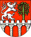 Herb Sułowa (powiat milicki)